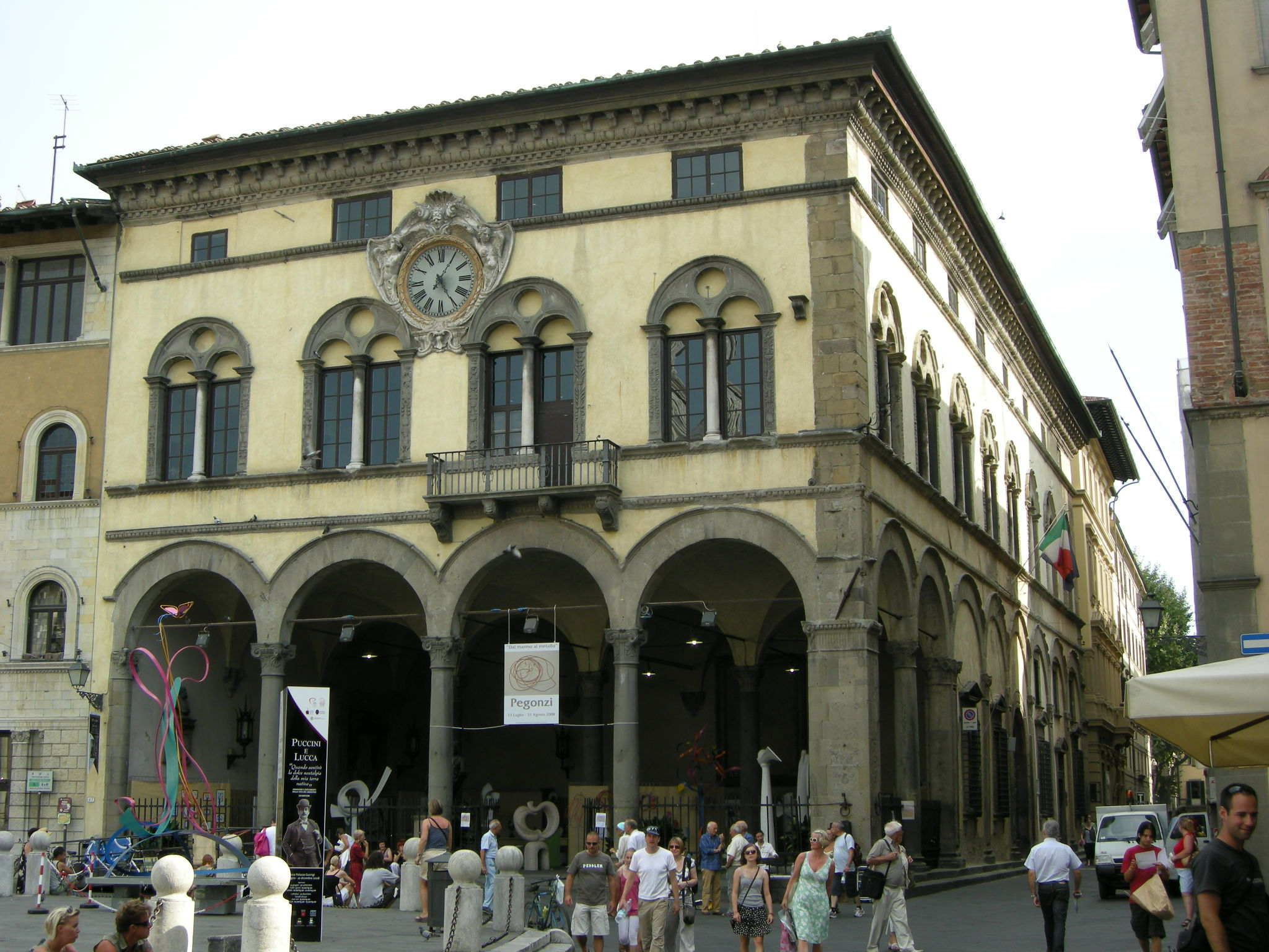 Palazzo pretorio, lucca